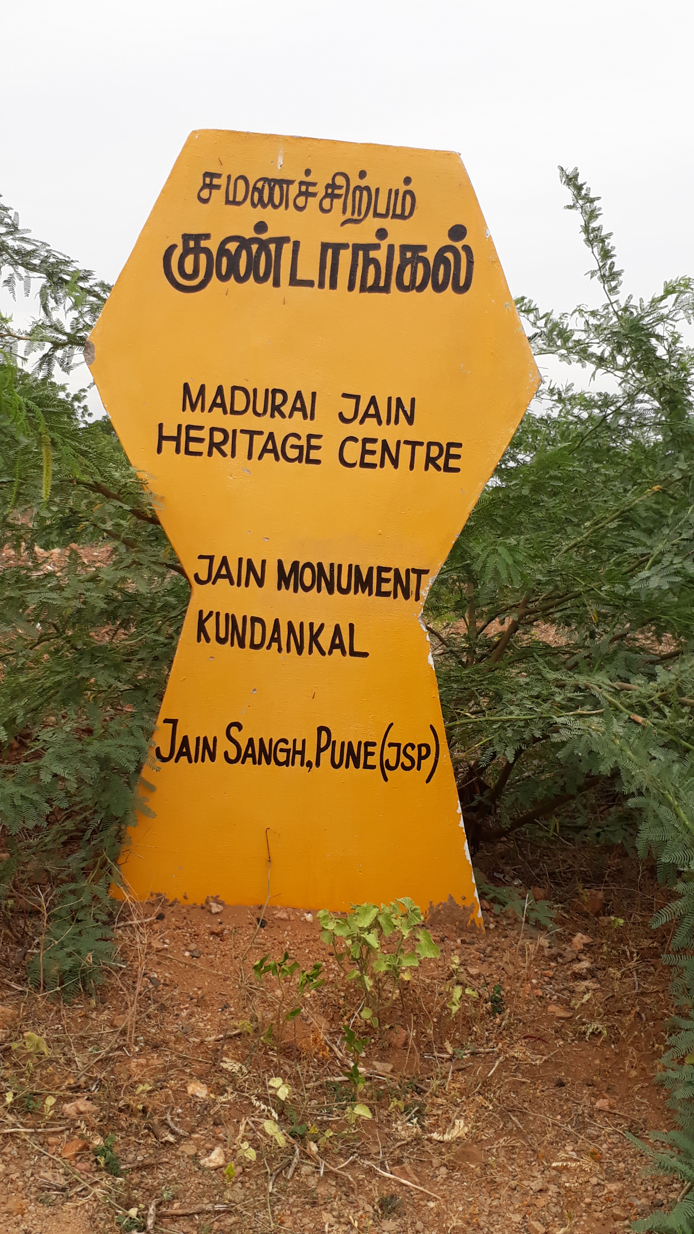 குண்டாங்கல் ஆய்வு செய்த நினைவுத் தூண்